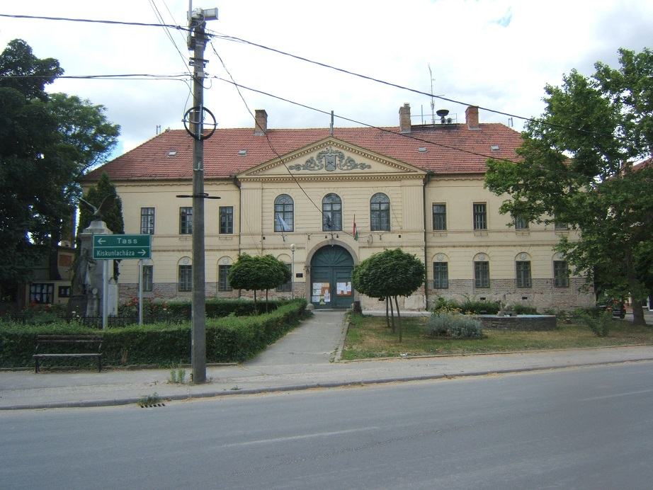 Városháza Épült 1825-ben, klasszicista stílusban. azonosító: 2319 törzsszám: 635. - Bács-Kiskun megye, Kunszentmiklós, Kálvin tér 12. Az épület állapota elég jó, de most az alsó részéről leverték a vakolatot felújítás miatt. Falán emléktábla: ,,PETŐFI SÁNDOR 1845 ÉVI LÁTOGATÁSÁNAK ÉS ITT TÖLTÖTT VIDÁM ÓRÁINAK EMLÉKÉRE. Az épületen kint lobog a székely zászló is, jelezve, hogy Kunszentmiklóson is támogatják Székelyföld autonómiáját. /by Zerind on muemlekm.hu/